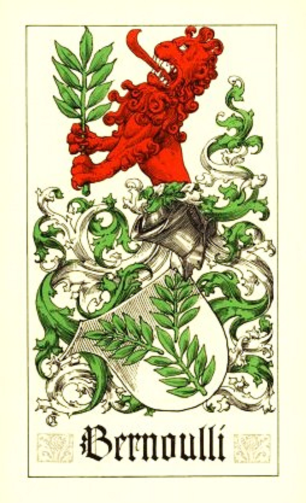 Wappen der Familie Bernoulli: Als Stammvater wird der niederländische Protestant Leon Bernoulli angesehen, der als Arzt in Antwerpen wirkte. Sein Sohn Jacob Bernoulli emigrierte um 1570 aus Glaubensgründen nach Frankfurt am Main. Dessen Enkel Jacob Bernoulli ließ sich um 1620 in Basel nieder und erwarb dort 1622 die Bürgerrechte.